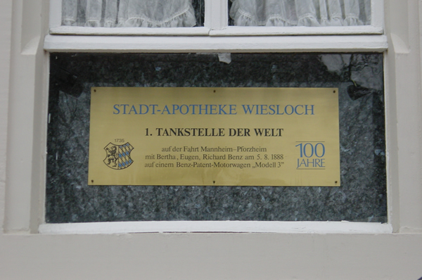 Schild Erste Tankstelle der Welt in Wiesloch